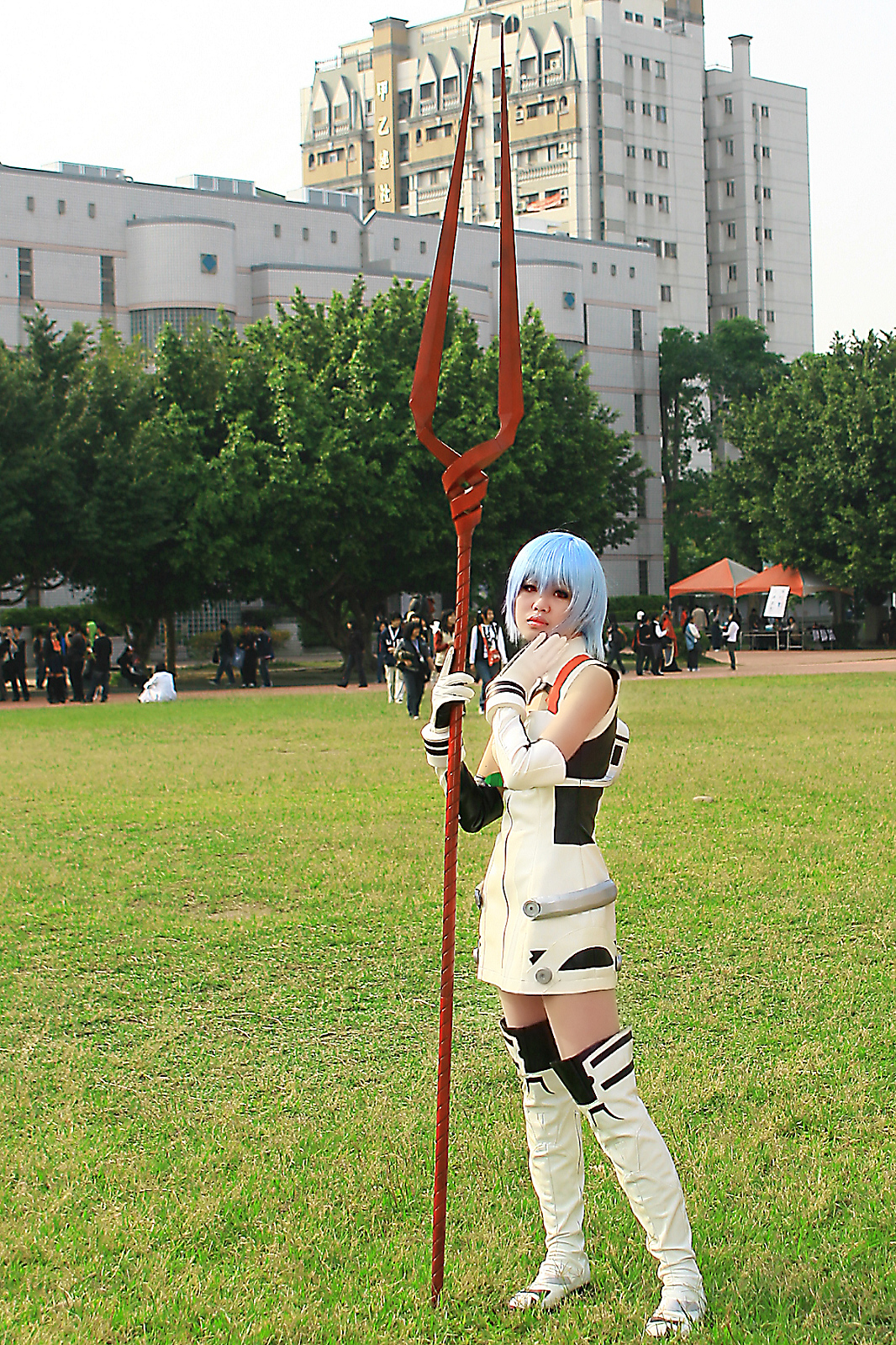 《新世紀福音戰士》綾波零cosplayer。